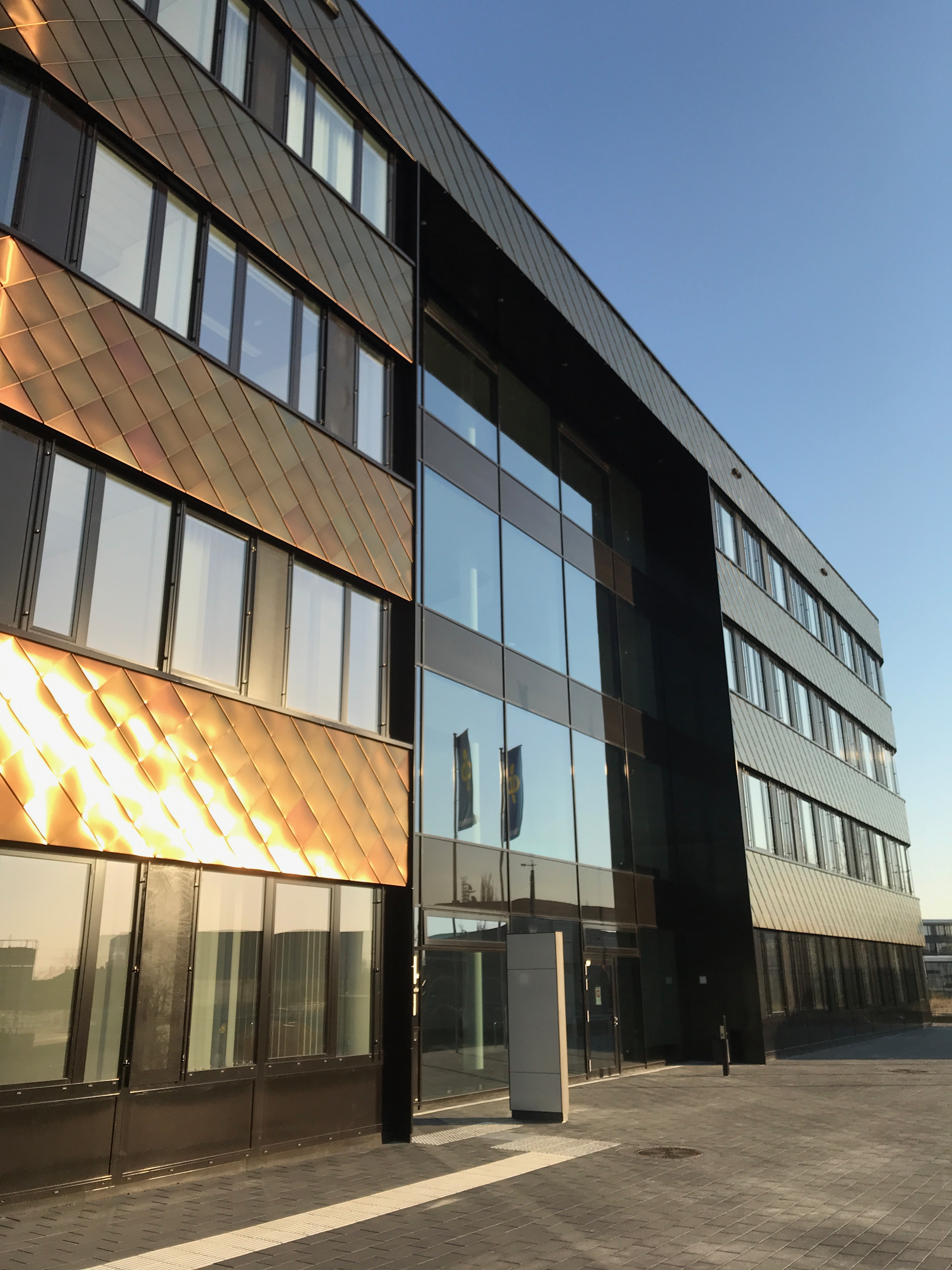 Neubau des Deutschen Zentrums für integrative Biodiversitätsforschung in Leipzig